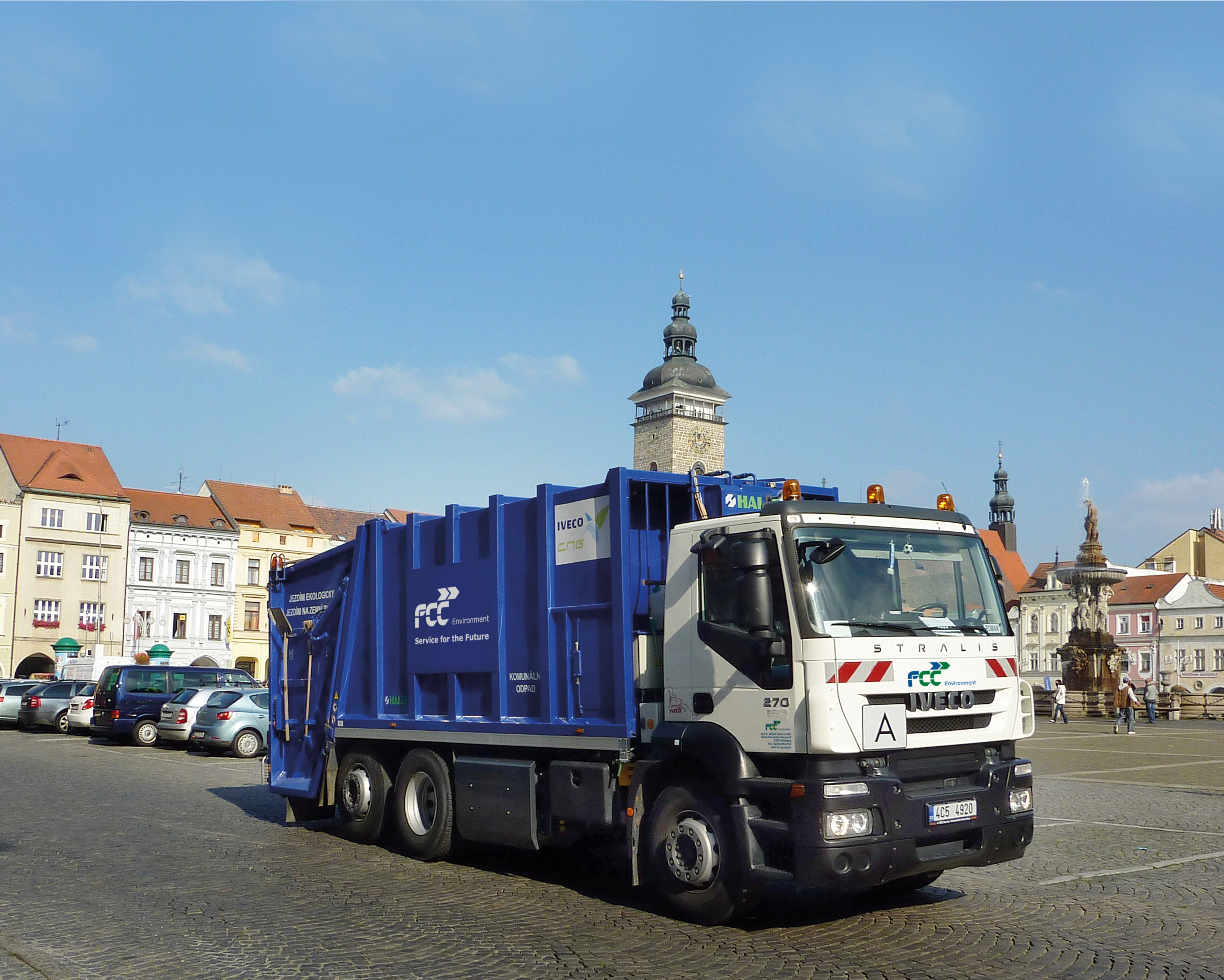 FCC Collection truck